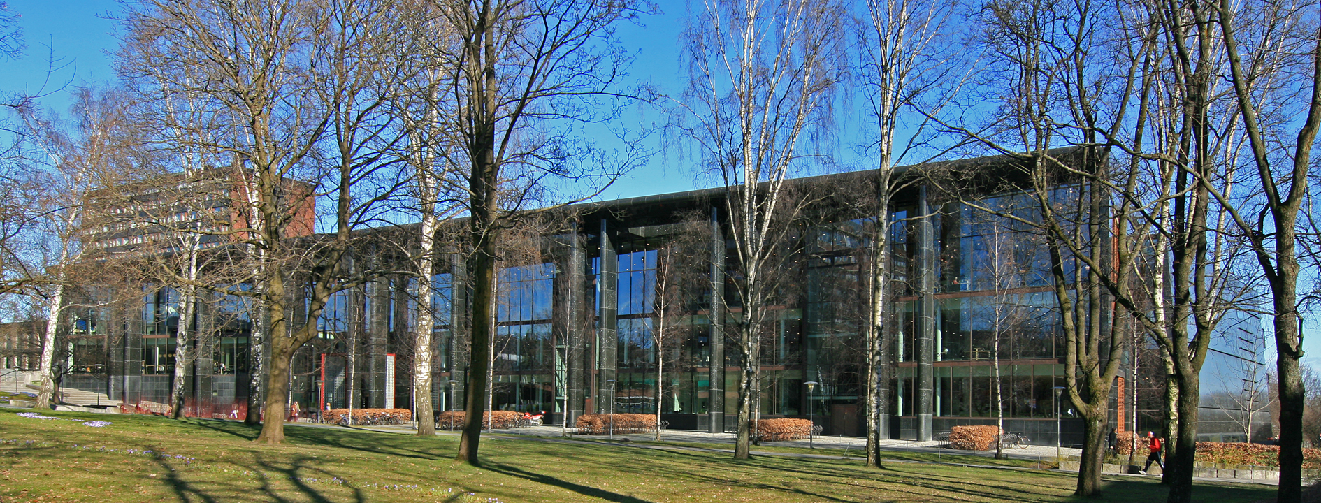 Georg Sverdrups hus (universitetsbiblioteket), Universitetet i Oslo. Oppført 1998; arktekter Telje-Torp-Aasen AS.